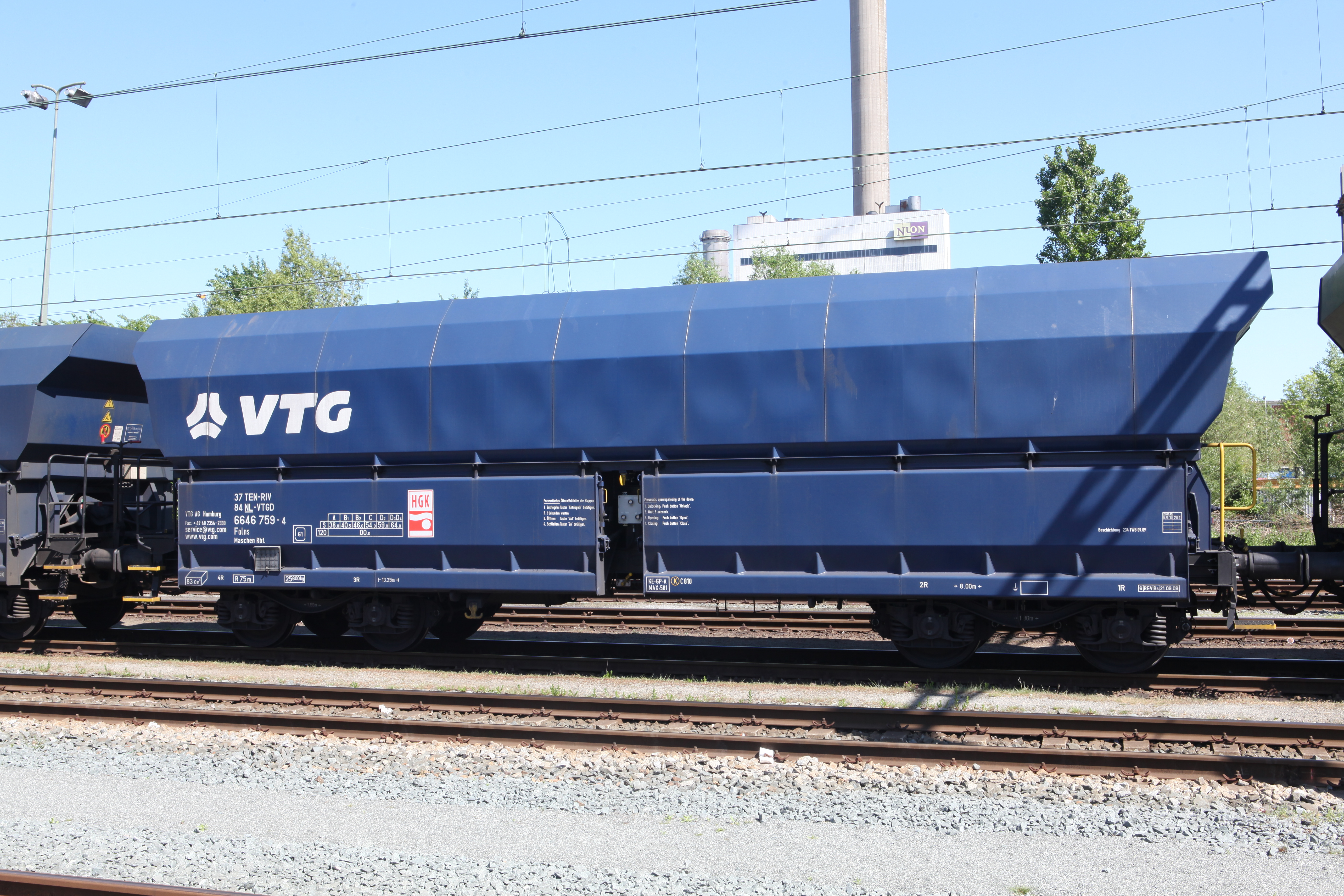 VTG Falns